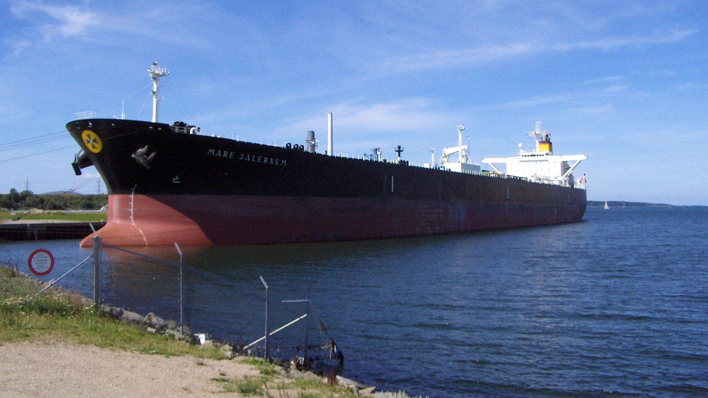 Tanker "Mare Salernum" in Kalundborg Habour